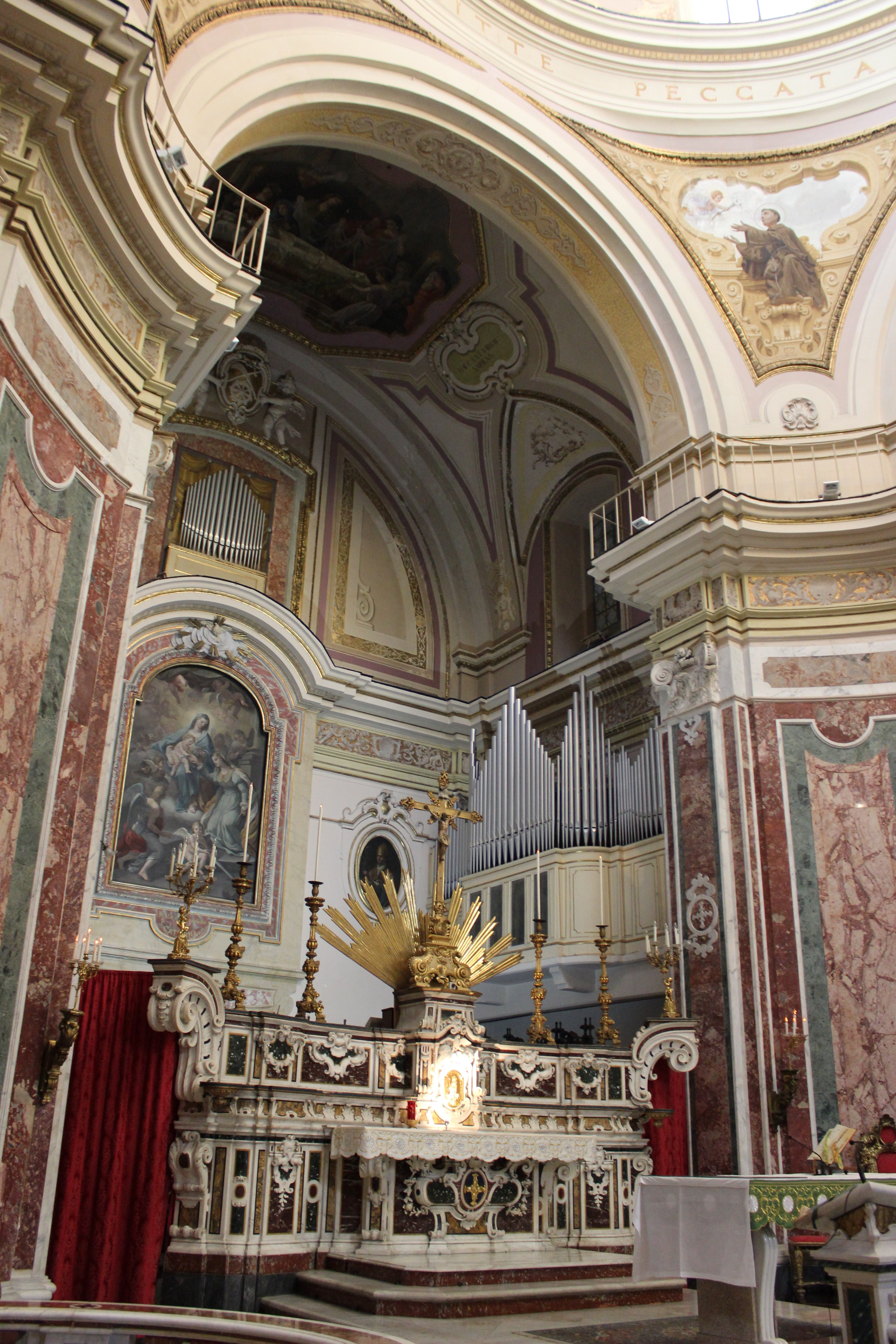 Santa Caterina a Chiaia. Altar mayor.